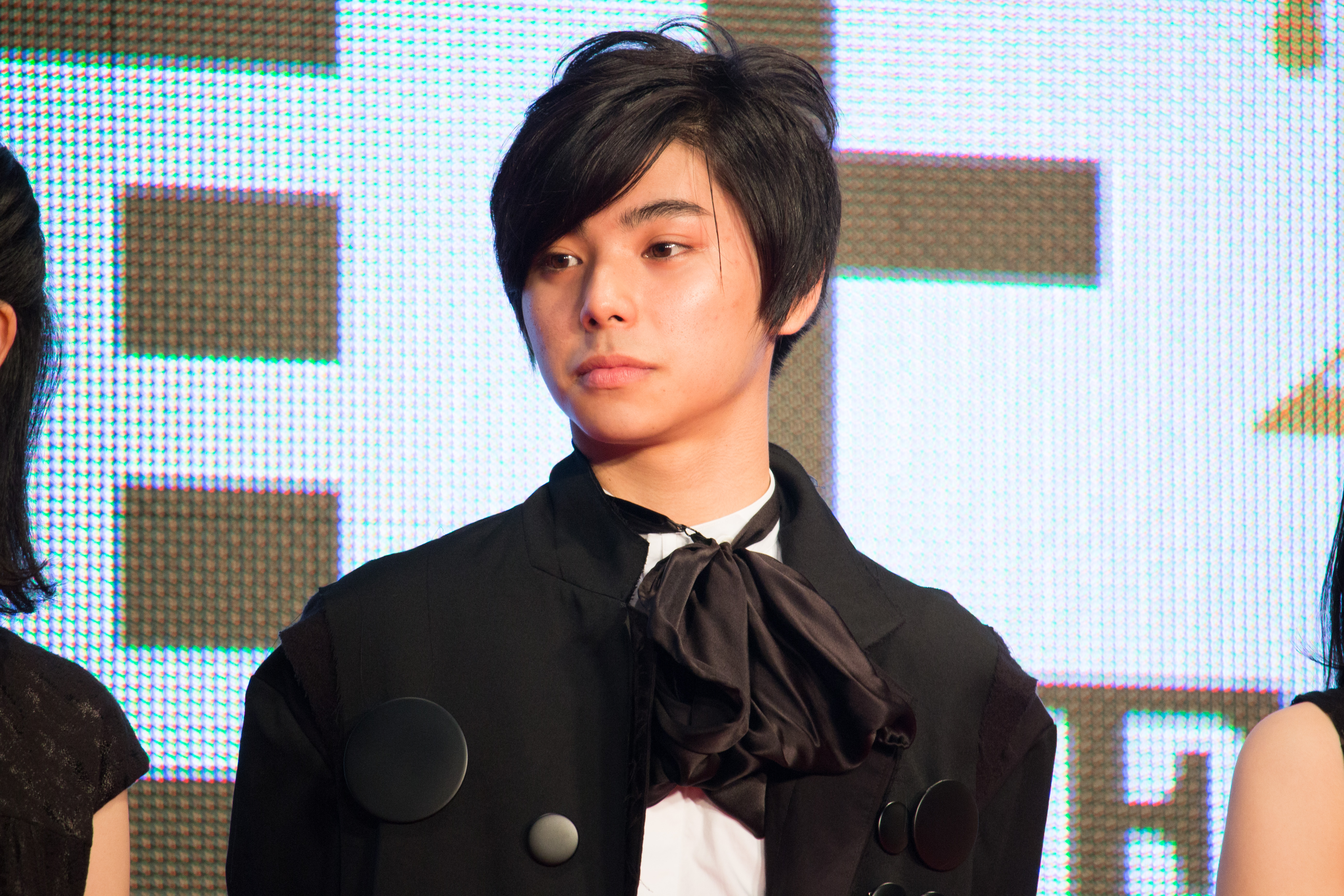 第28回 東京国際映画祭 オープニングセレモニー 村上虹郎 (さようなら)